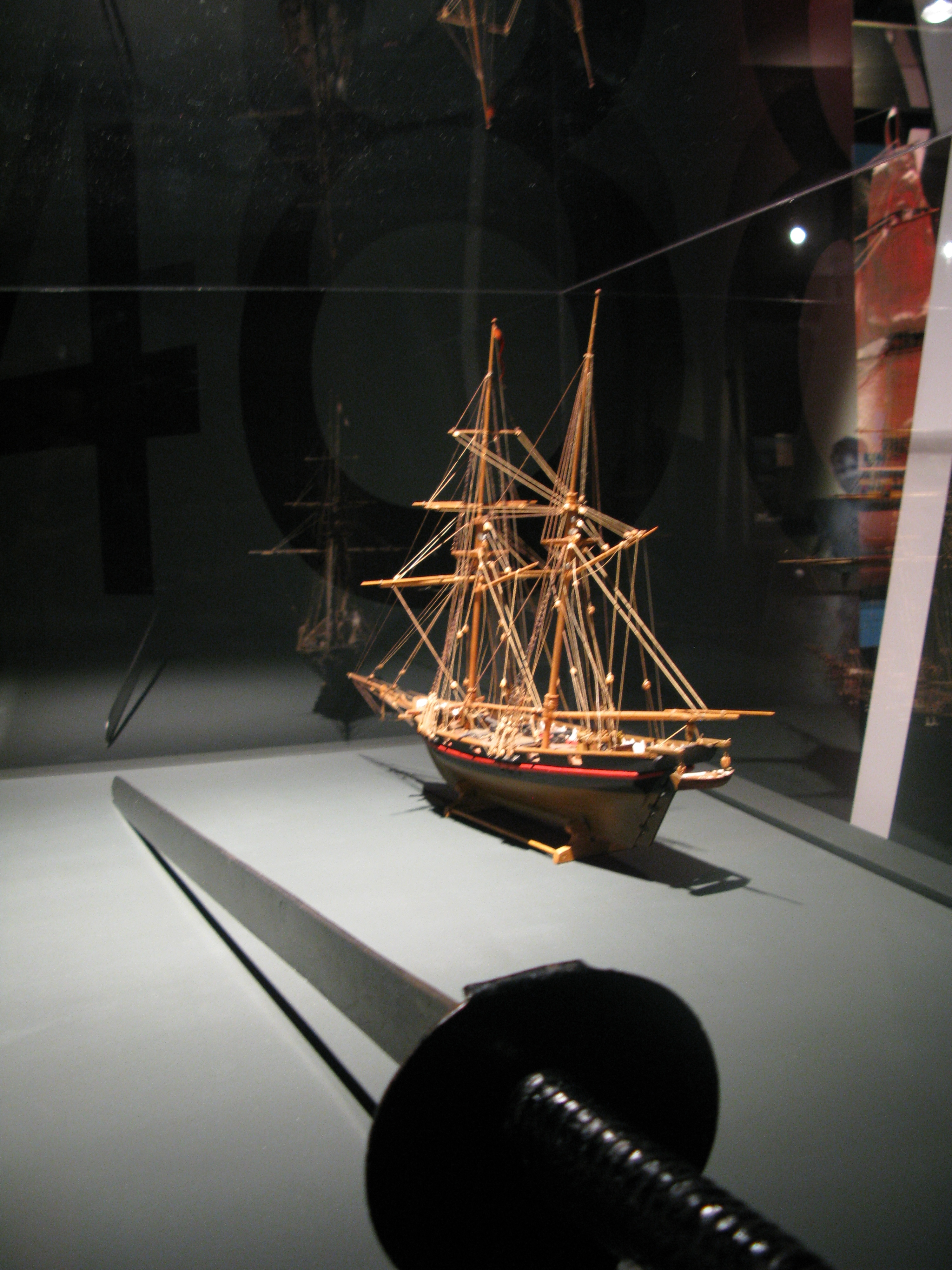 Français cadien: Modèle réduit de la goélette de guerre Swallow (coll. Musée naval de Québec) et sabre d'abordage (Musée du Royal 22e Régiment)